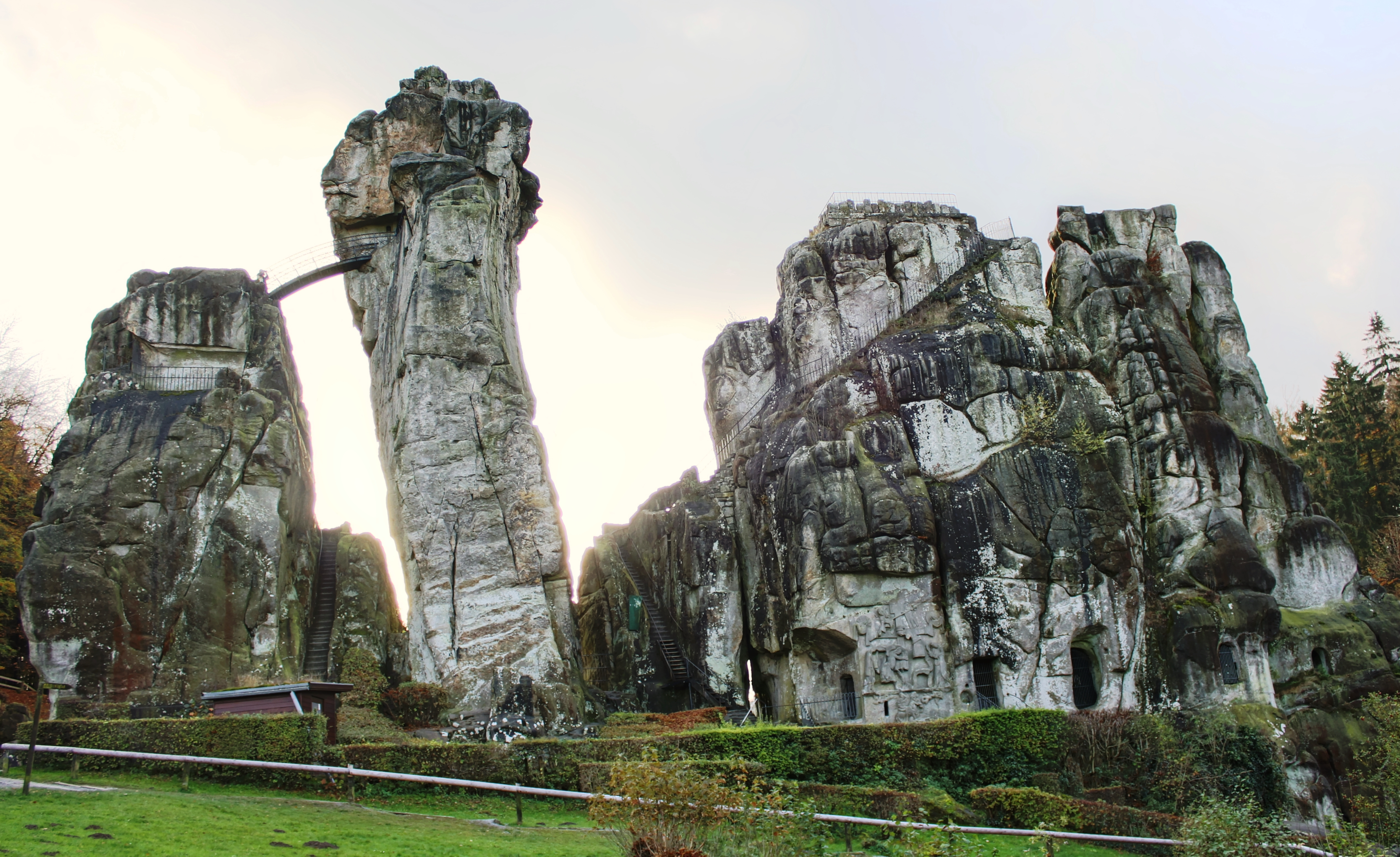 Externsteine